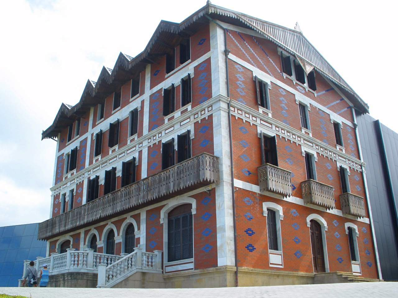 Palacio de Aldamar-Cristobal Balenciaga Museoa (Getaria)